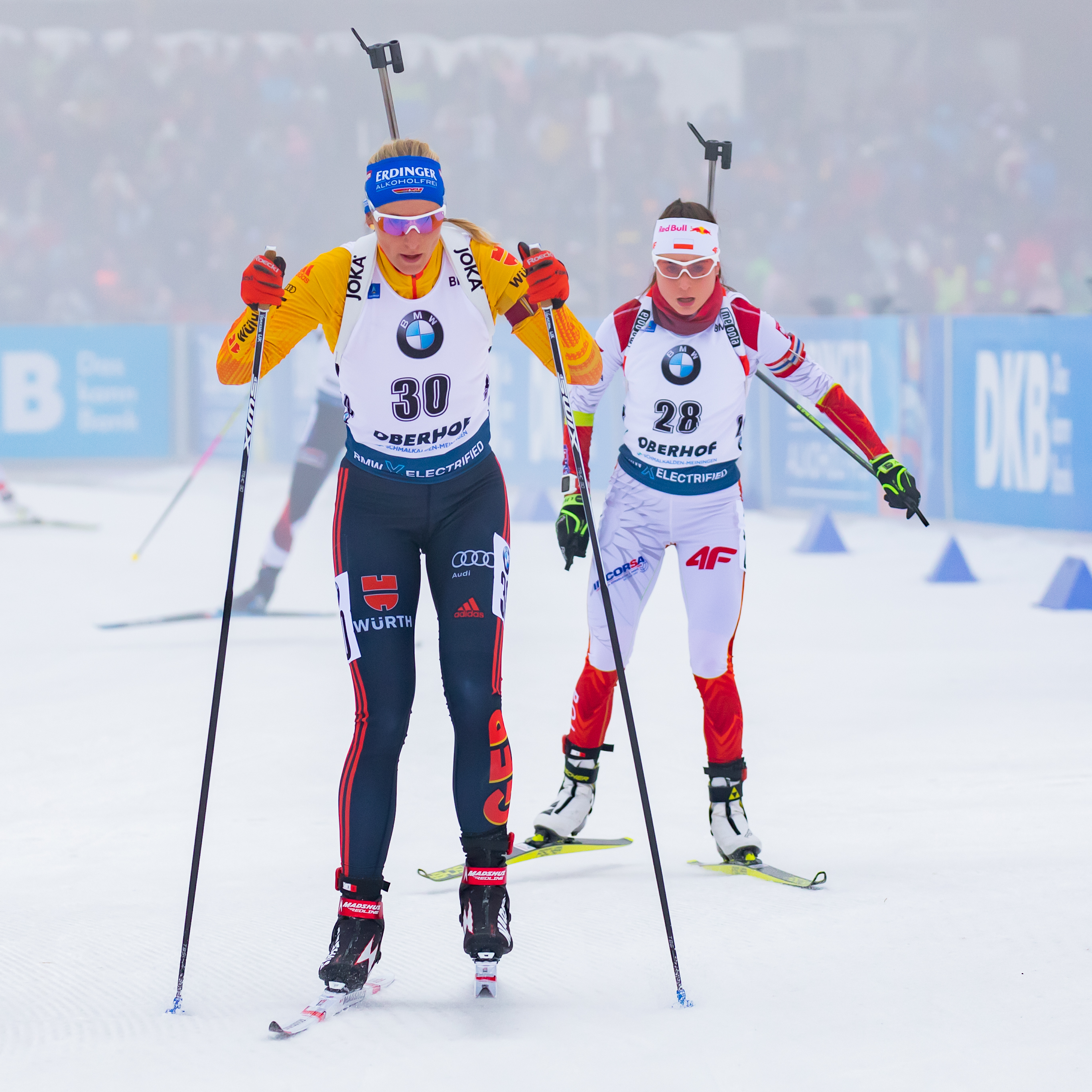 IBU World Cup Biathlon Oberhof; Vanessa Hinz (GER, Deutschland) vor Kamila Zuk (POL, Polen)